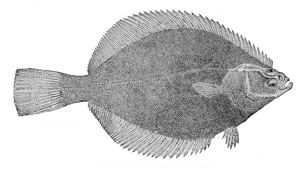 Liopsetta glacialis